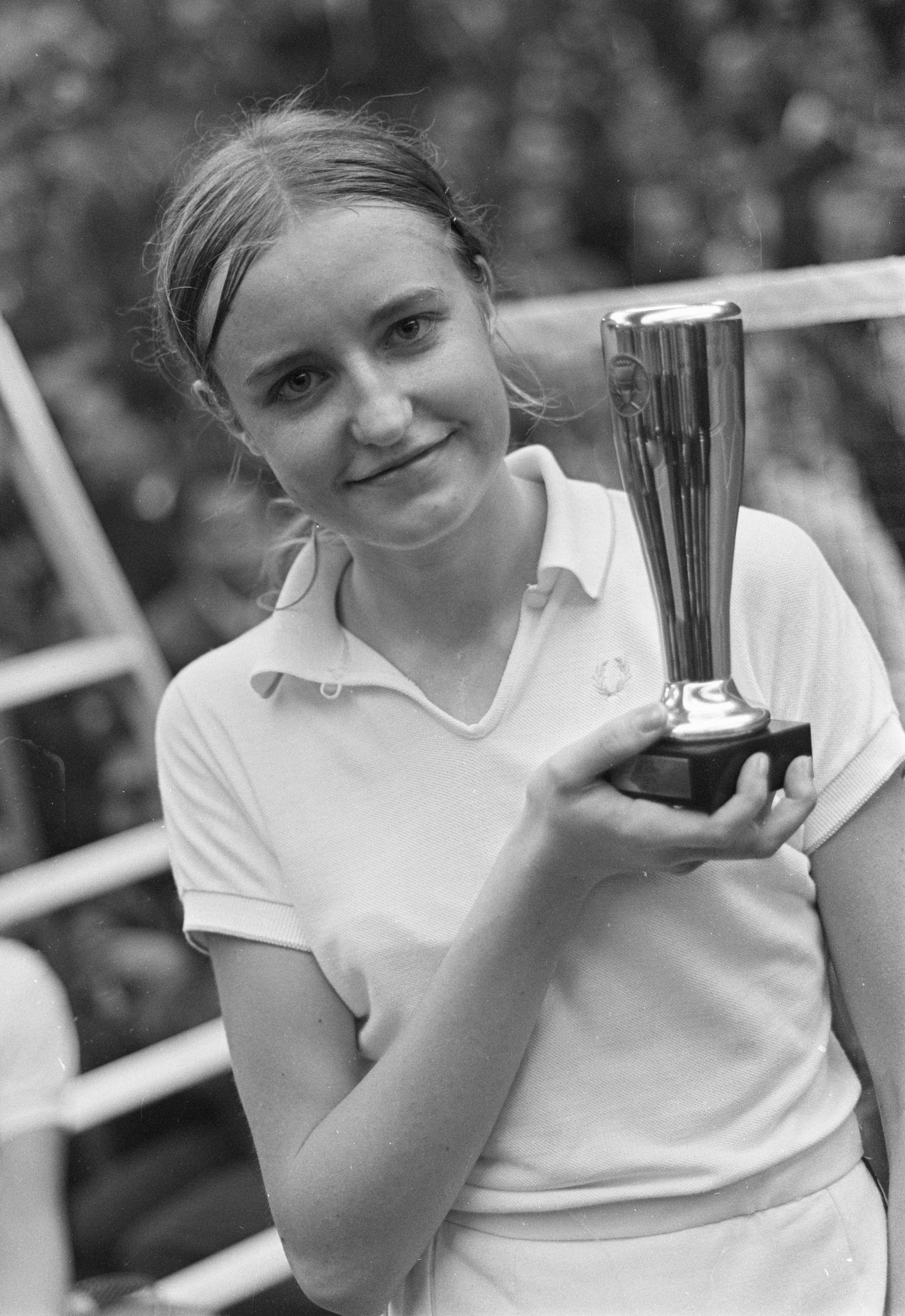 Internationale Badmintonkampioenschappen te Haarlem; Gillian Perrin (Gillian Gilks) met beker